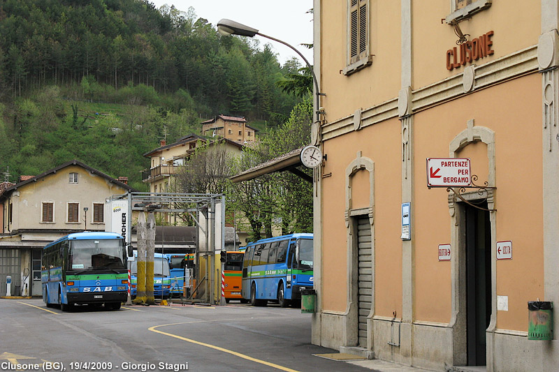 L’ex stazione ferroviaria di Clusone, ora in uso come stazione degli autobus.